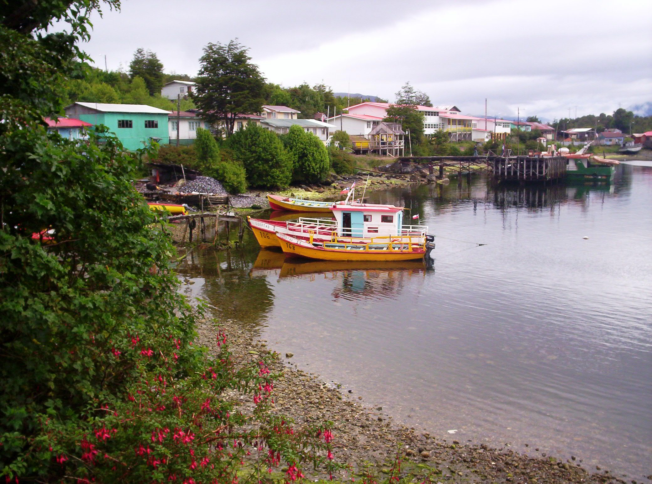 Vista de embarcaciones y gran parte de la localidad.